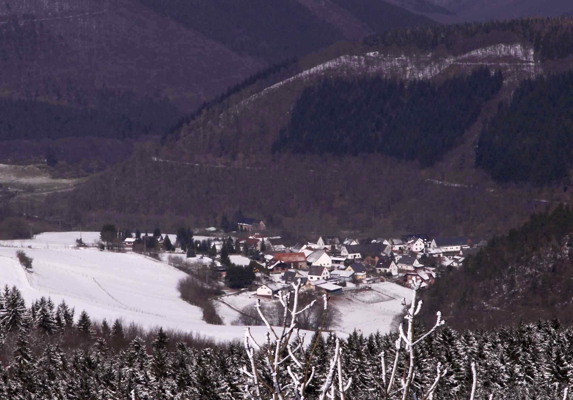 Kaltenborn/Eifel, von der Hohen Acht aufgenommen